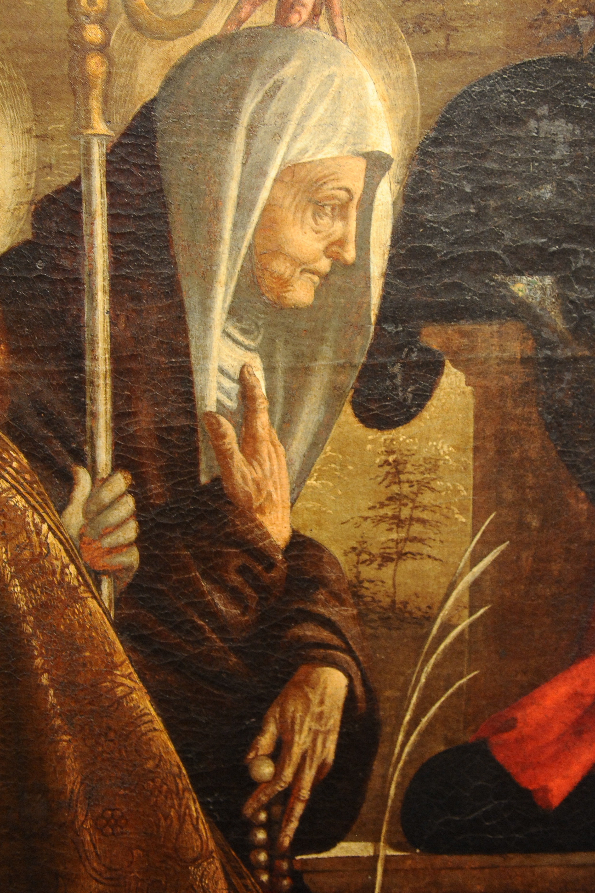 detail: Saint Maxentia